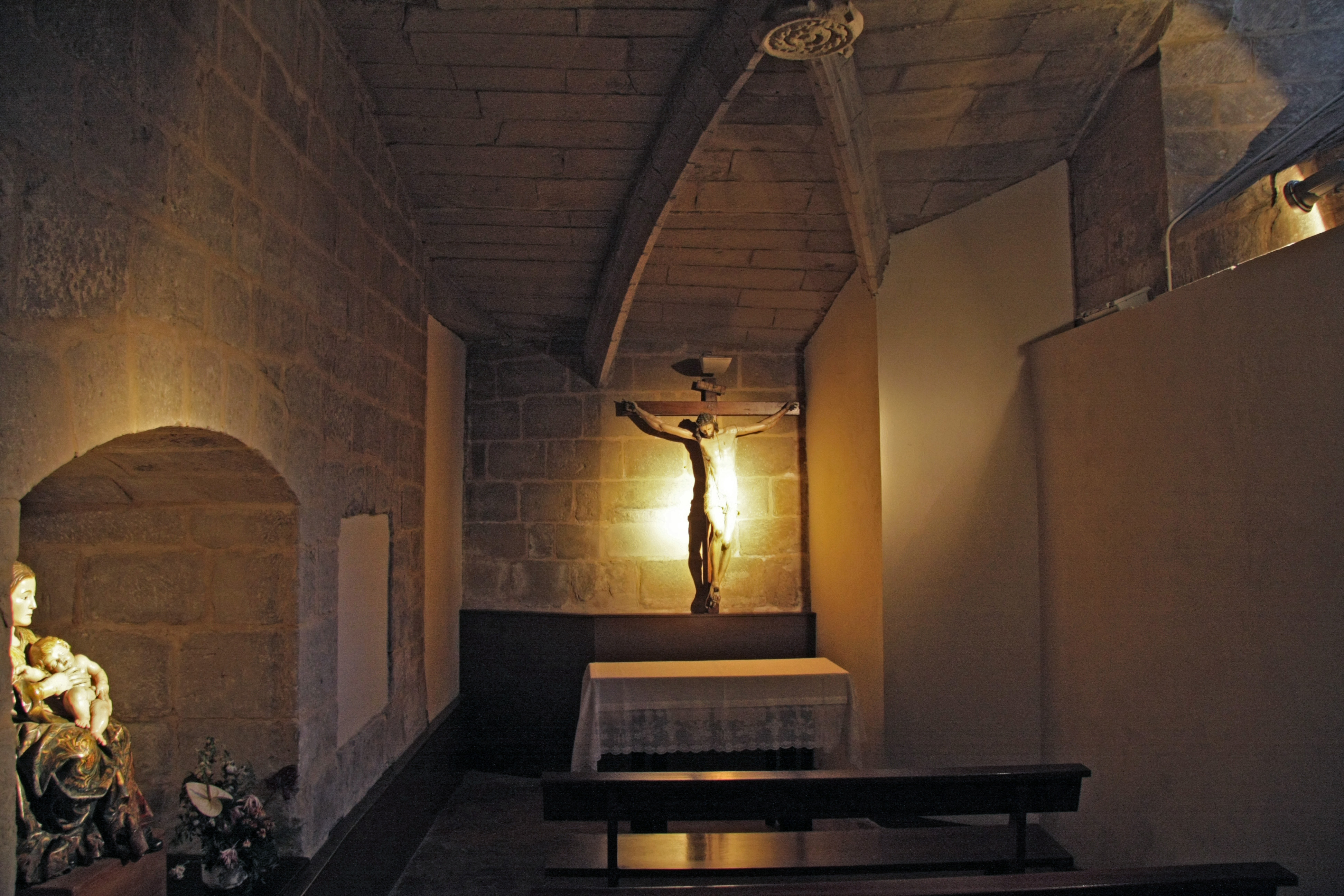 Cripta de la Iglesia de Santiago el real, en Logroño.